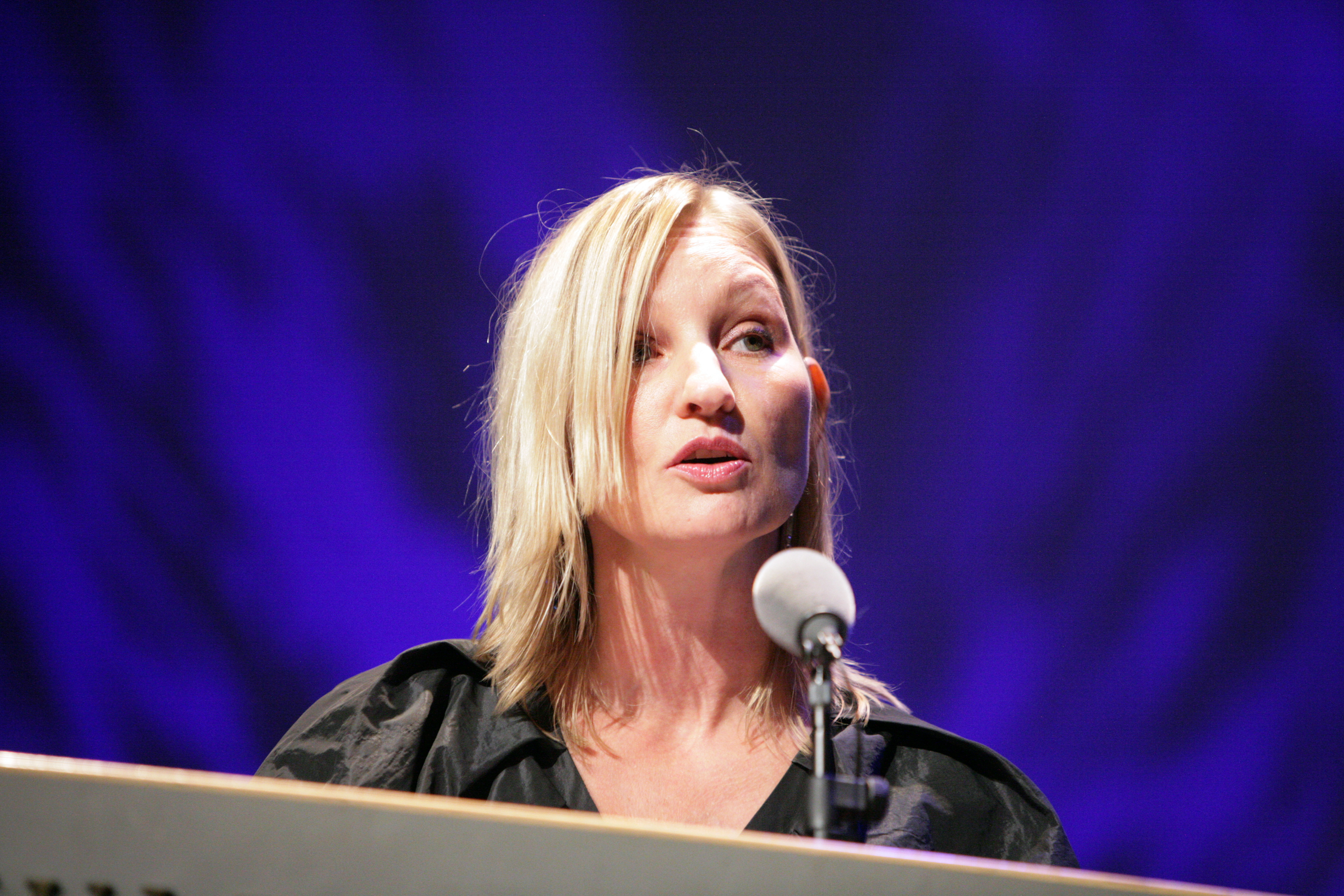 Naja Marie Aidt - vinnare av Nordiska rådets litteraturpris år 2008. Vid prisutdelningen i Helsingfors 2008-10-72